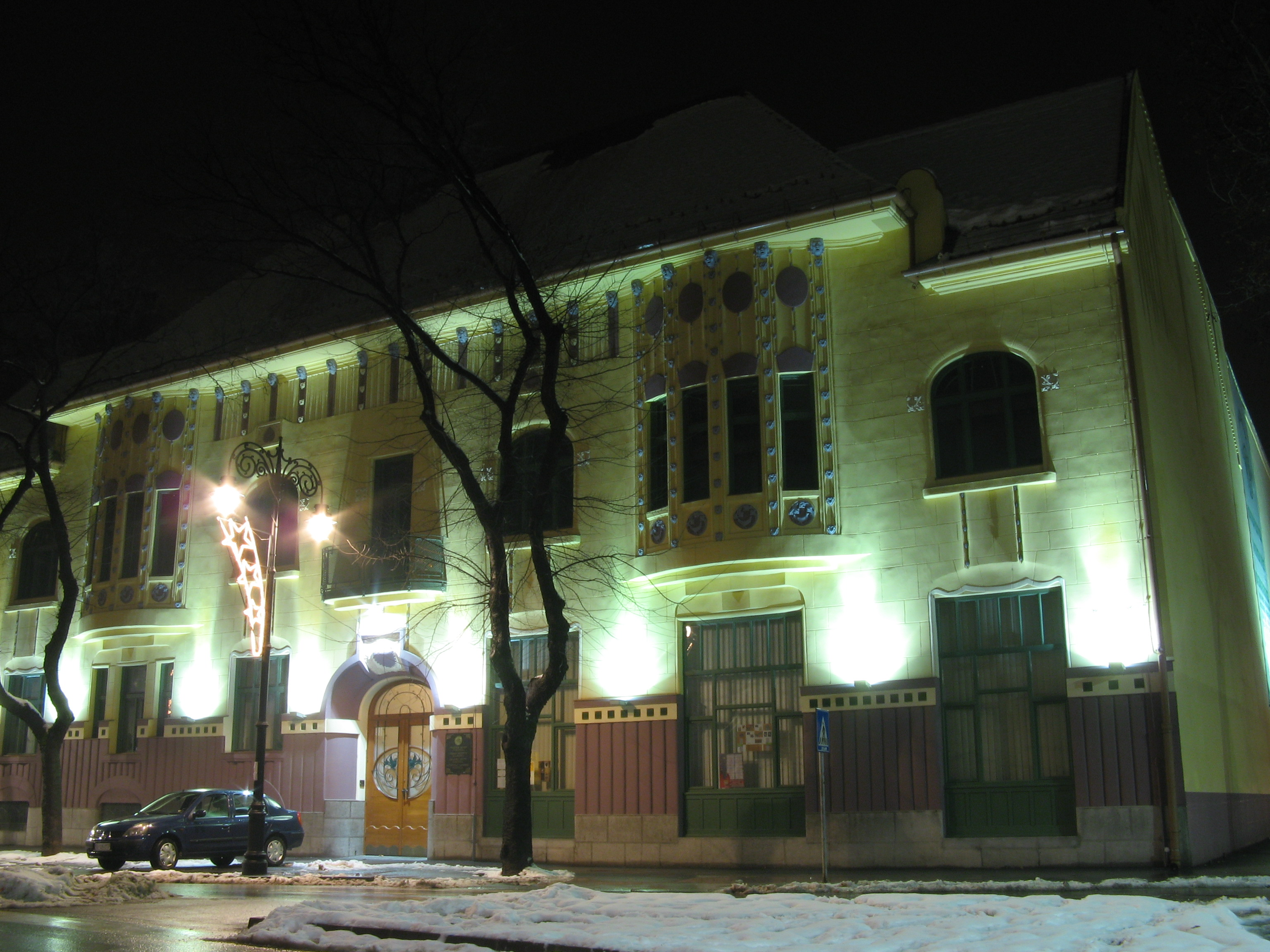 Зграда Градског музеја у Суботици. Саграђена је 1906. године као најамна кућа Микше Деметера, лекара и предузетника. Будимпештанске архитекте Јожеф и Ласло Ваго су је пројектовали инспирисани архитектуром сецесије Беча и Дармштата. Од Другог светског рата до 2007. године у згради се налазила штампарија Минерва.